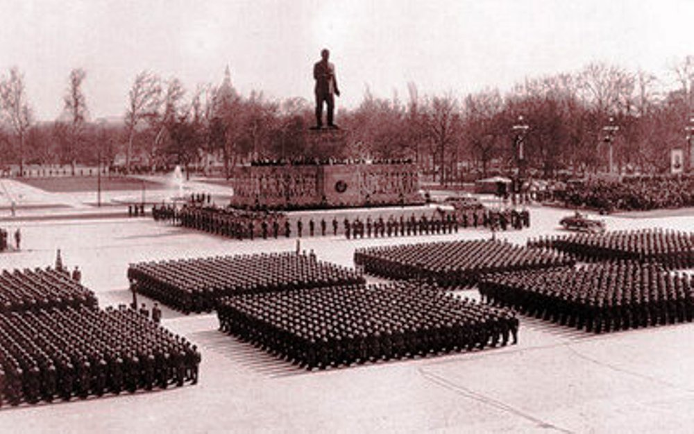 Budapest. A lebontott Regnum Marianum teplom helyén épített tribün, a fölé magasodó Sztálin szoborral